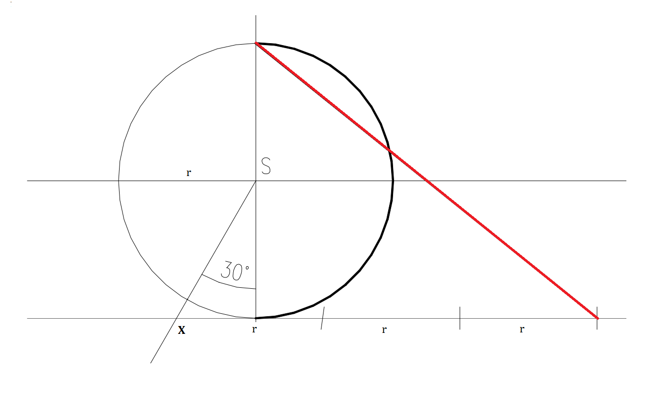 approximation of the length of a circle/ délka oblouku přenesena na úsečku